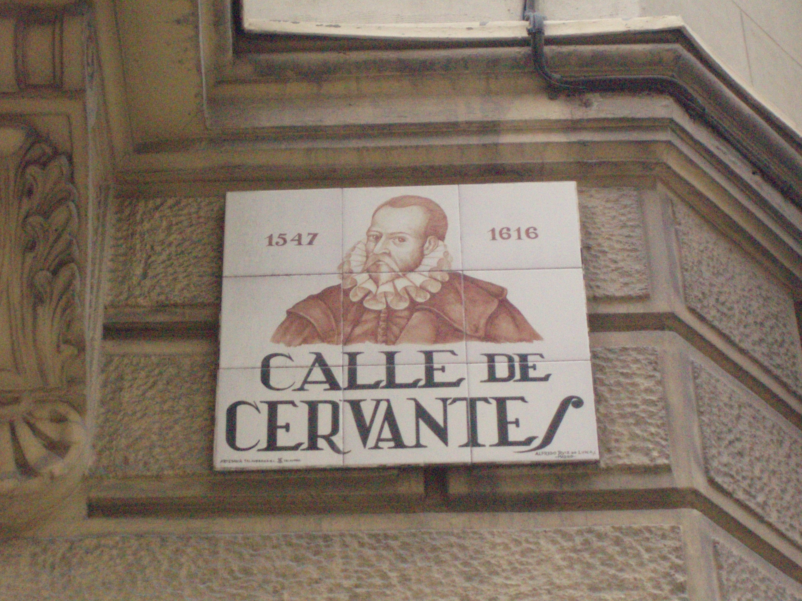 Imagen de Cervantes en la placa que lleva su nombre.